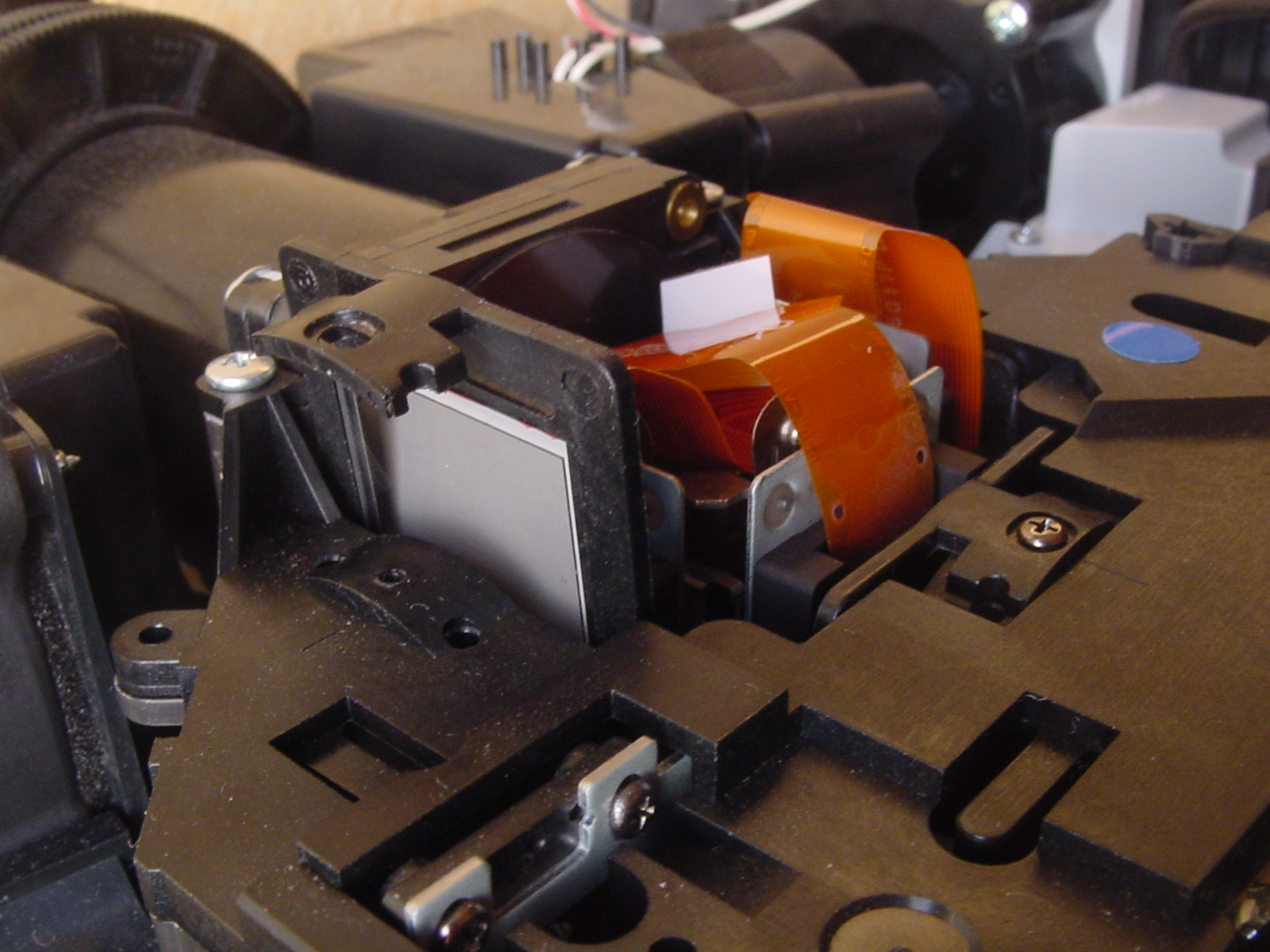 Ausgeführte Umsetzung des separated polarizer bei einem LCD-Projektor mit 3 LCDs (RGB). Zur Verdeutlichung der Konstruktion wurde einer der drei Polarisatoren mit seinem Tragerahmen aus seinem zugehörigen Luftschacht gezogen und mit einer hinterlegten weißen Folie sichtbar gemacht.